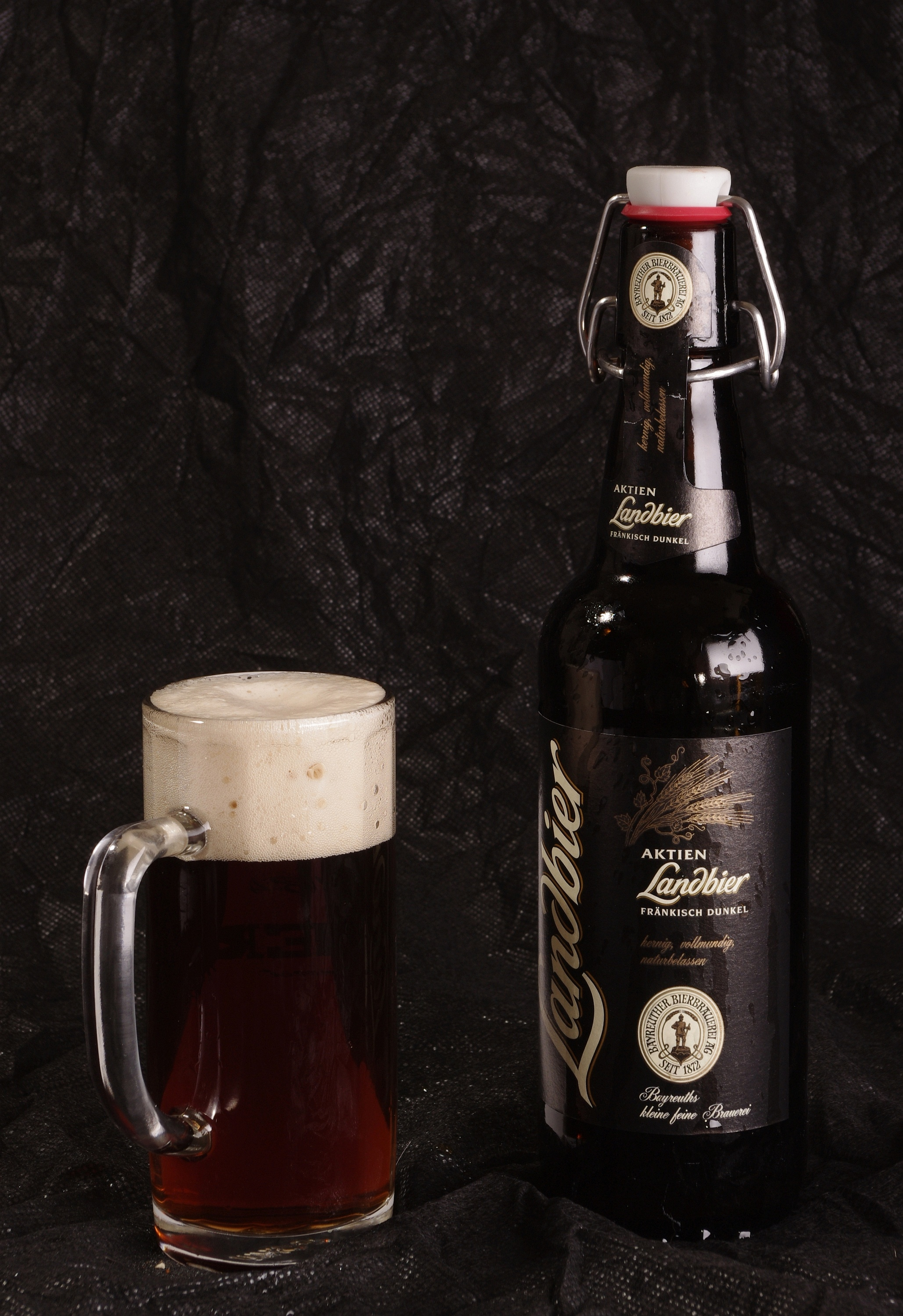 Dunkles Landbier aus Bayreuth